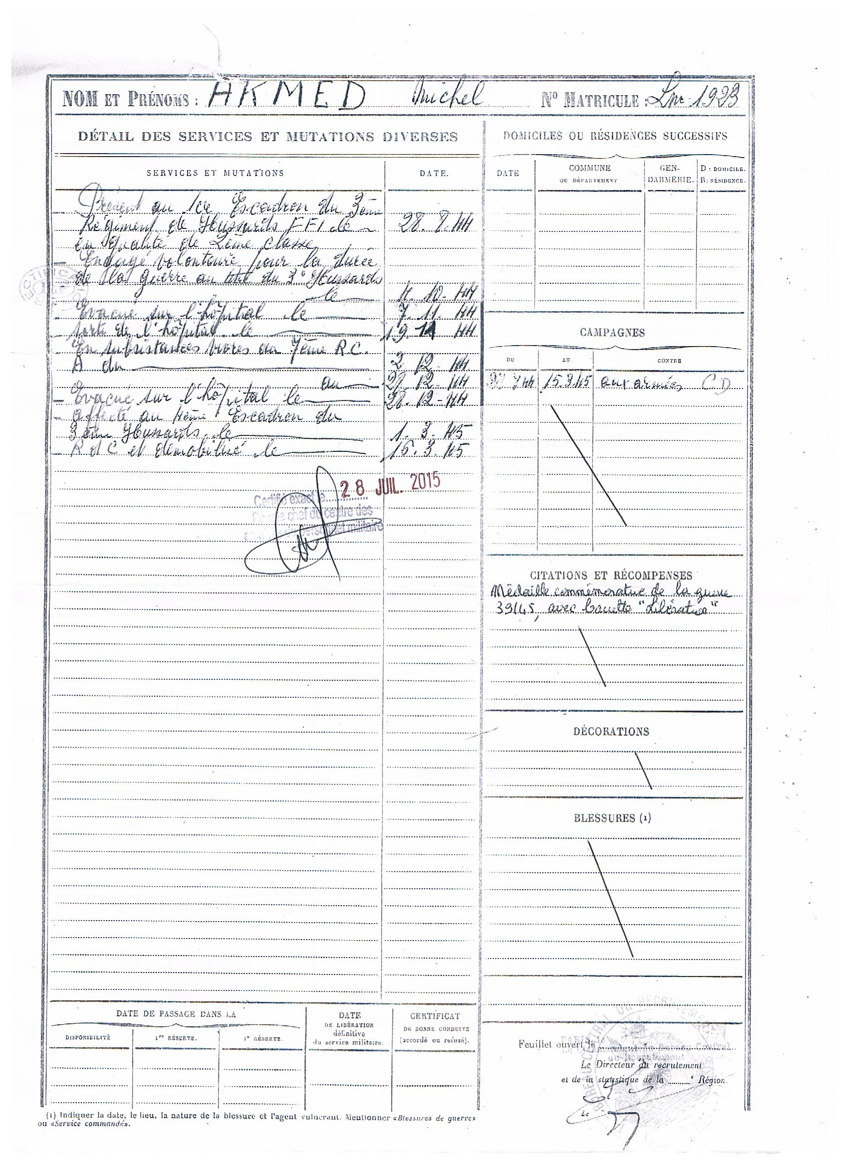 provenant de la service historique de la defense